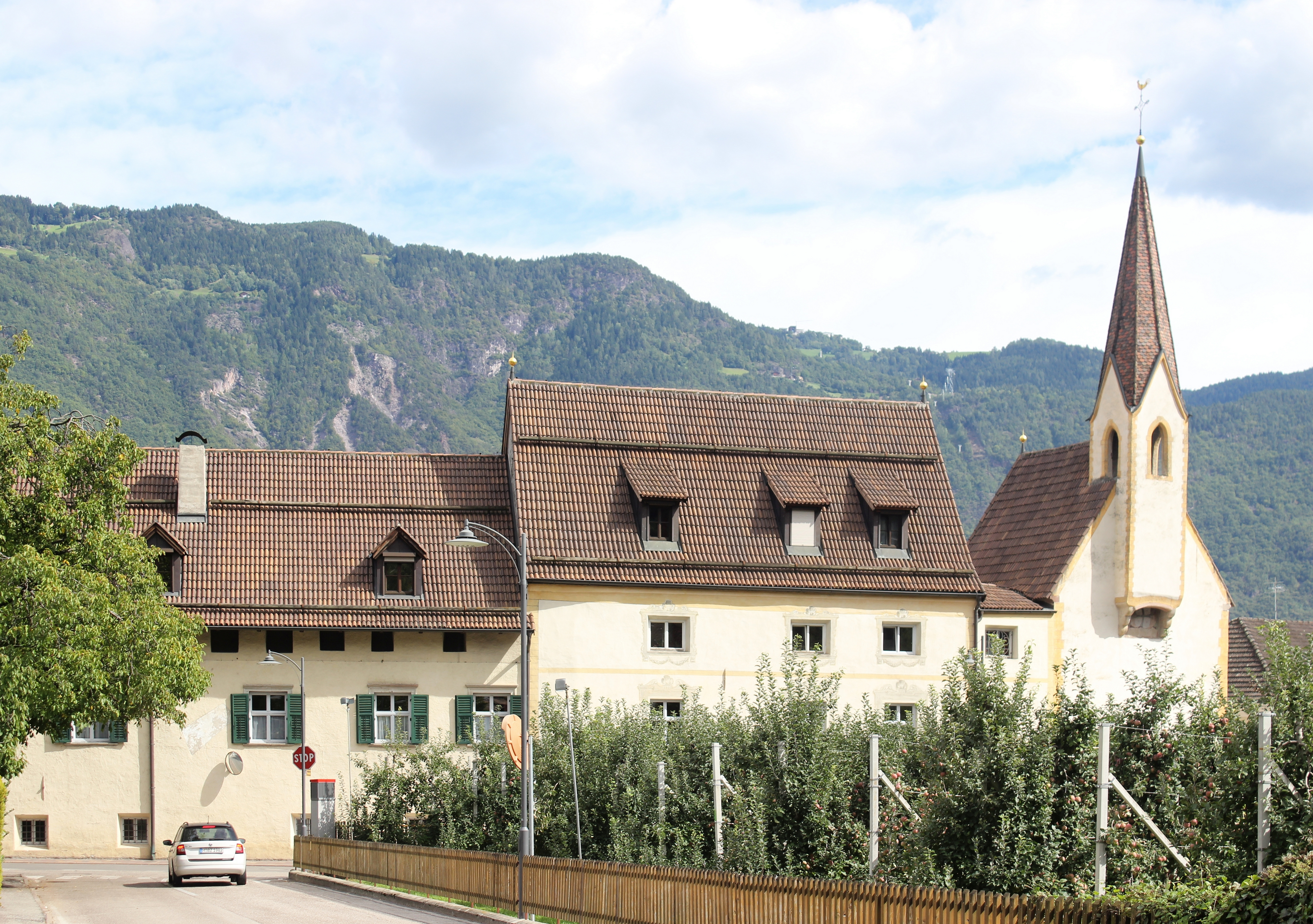 Alter Widum mit Annakapelle in Lana